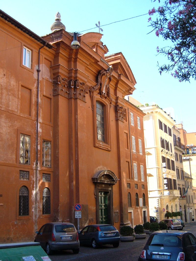 Chiesa di Gesù Bambino all'Esquilino, nel rione Monti, a Roma. Foto personale.